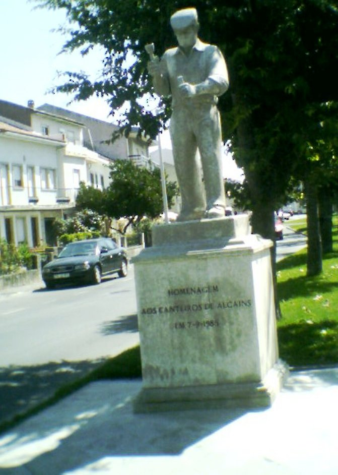 Estátua do Canteiro, Alcains, Castelo Branco.